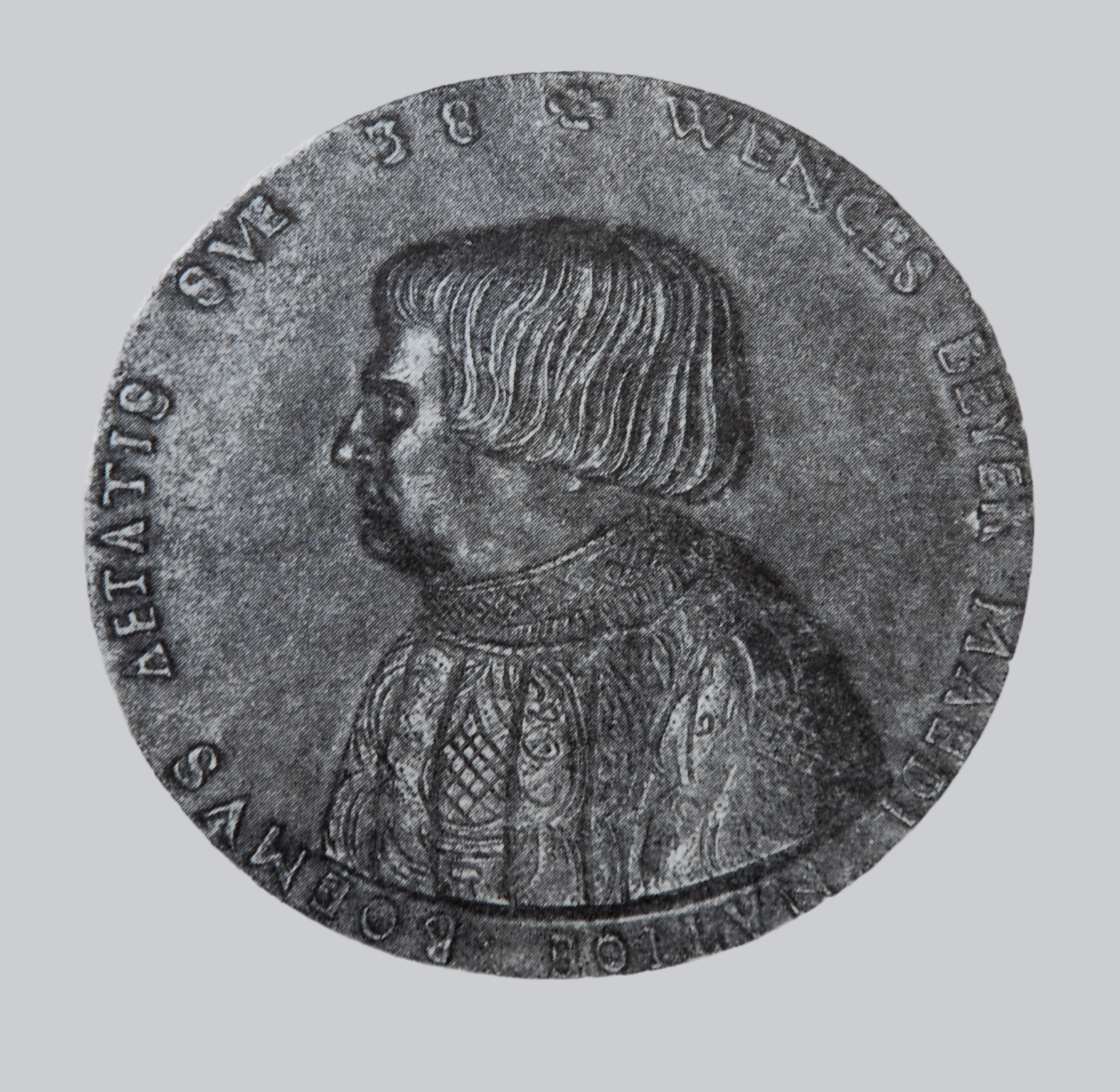 Pamětní medaile Václava Payera z Lokte